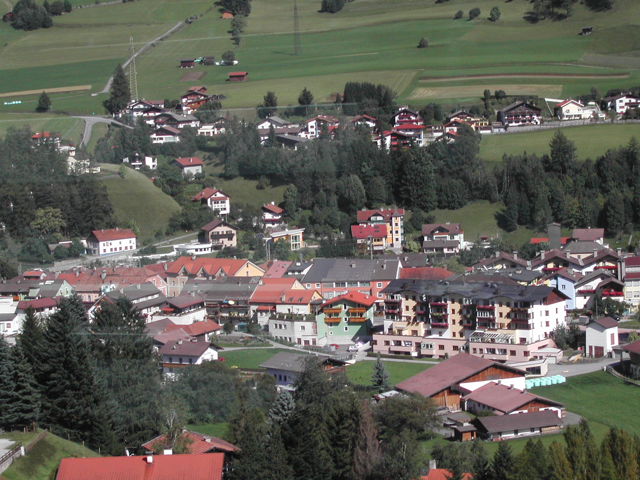 Steinach am Brenner